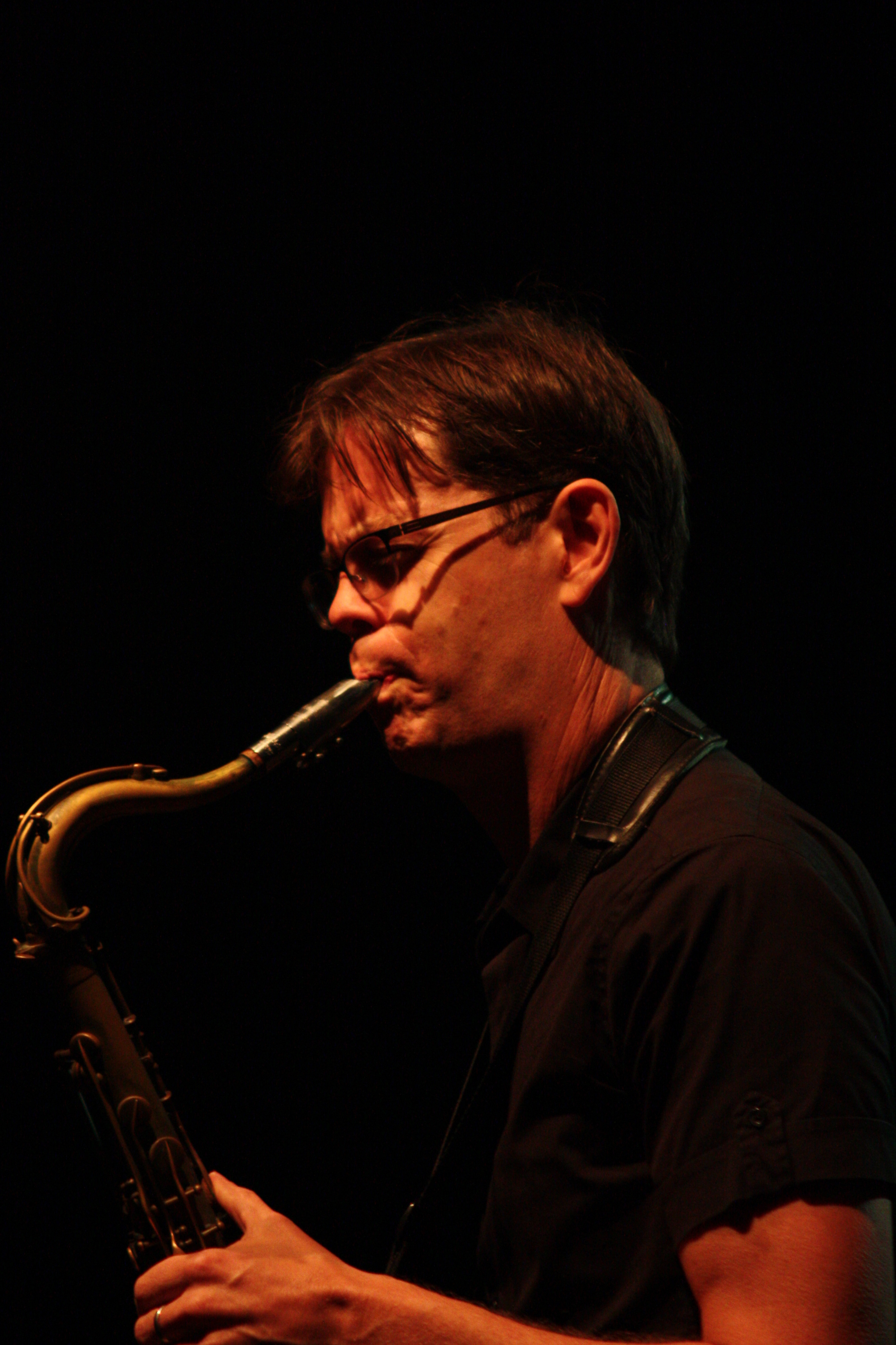 44. Deutsches Jazzfestival Frankfurt 2013: Donny McCaslin